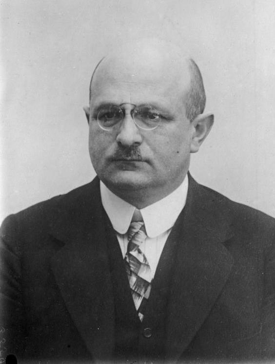 Prof. Dr. C. Ramsauer, der Ordinarius für Experimental-Physik und Diektor des Physikalischen Instituts der Technischen Hochschule wurde zum Leiter des neugeschaffenen Forschungs... der A.E.G. in Berlin, für Physik, Elektrotechnik und Akustik, Metallurgie und Chemie, ernannt. Prof. Ramsauer ist während des Krieges durch seine erfolgreichen Arbeiten auf dem Gebiete der Flugzeugabwehr bekannt geworden.